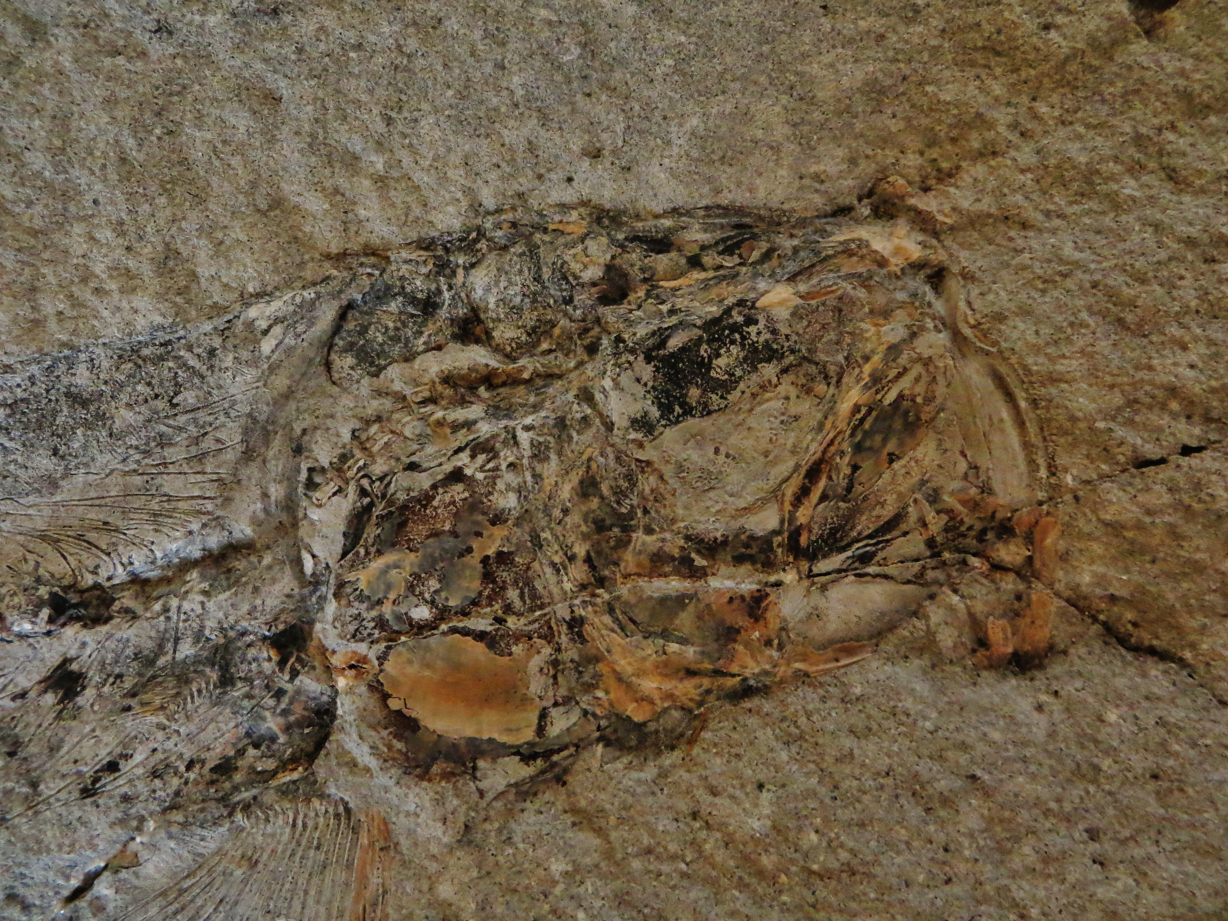 Fossil of Histiothrissa- Took the picture at Teylers Museum, Haarlem